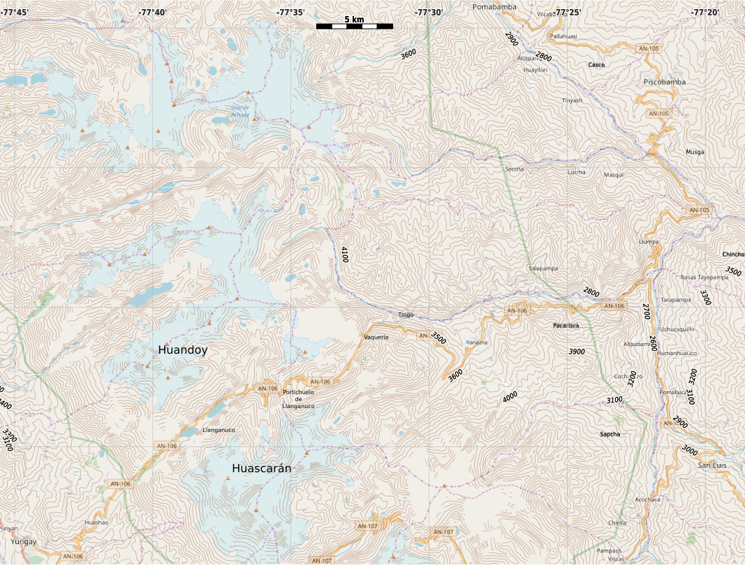 Cruce de los Andes (1883)